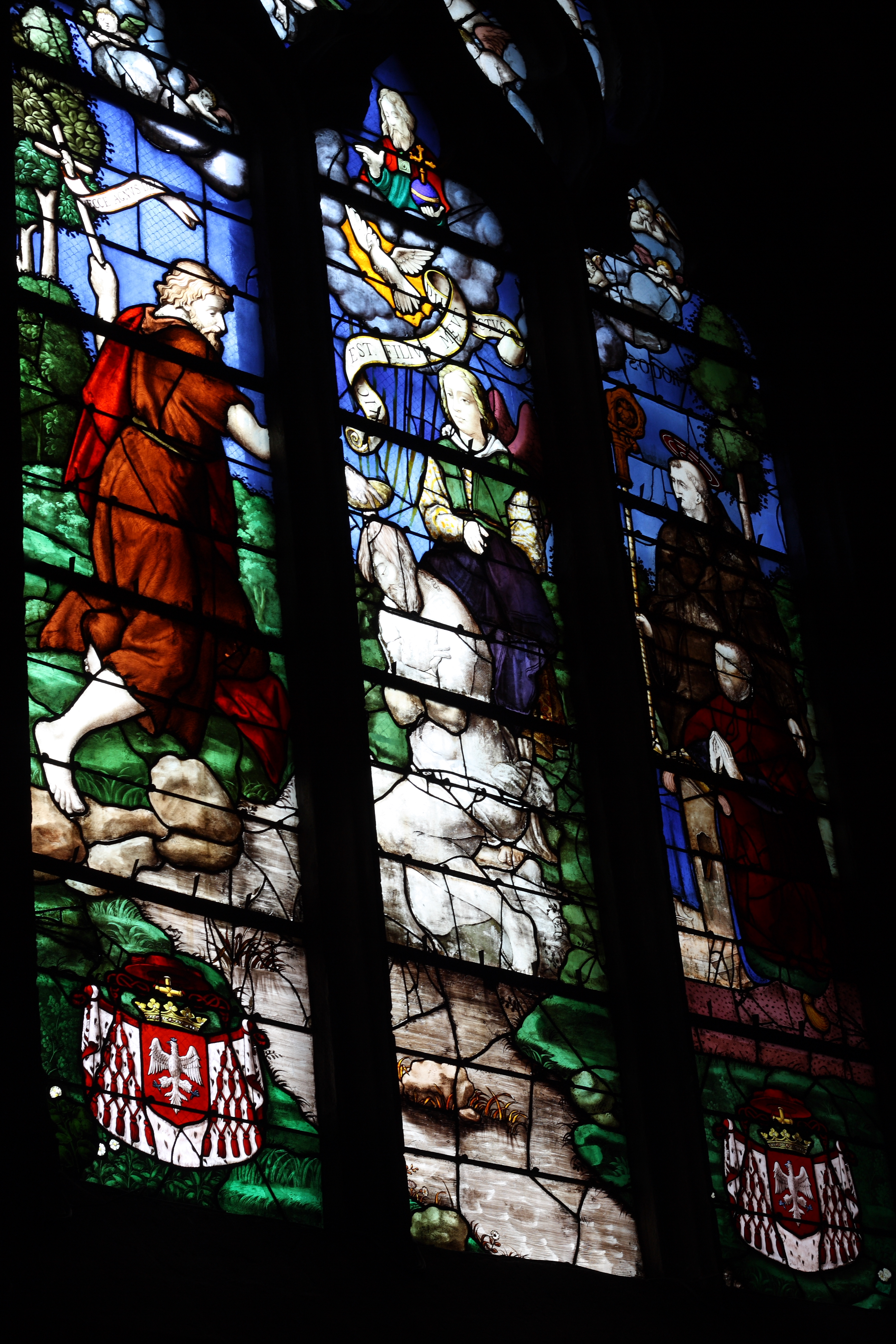 Bleiglasfenster Nr. 10 (16. Jahrhundert) in der katholischen Pfarrkirche Saint-Martin (Collégiale Saint-Martin) in Montmorency, Darstellung: Taufe Christi und der Stifter Odet de Châtillon (knieend) mit dem hl. Odon (siehe: Dominique Foussard, Charles Huet, Mathieu Lours: Églises du Val-d'Oise. Pays de France, Vallée de Montmorency. Société d'Histoire et d'Archéologie de Gonesse et du Pays de France, 2. Auflage, Gonesse 2011, ISBN 9782953155426)